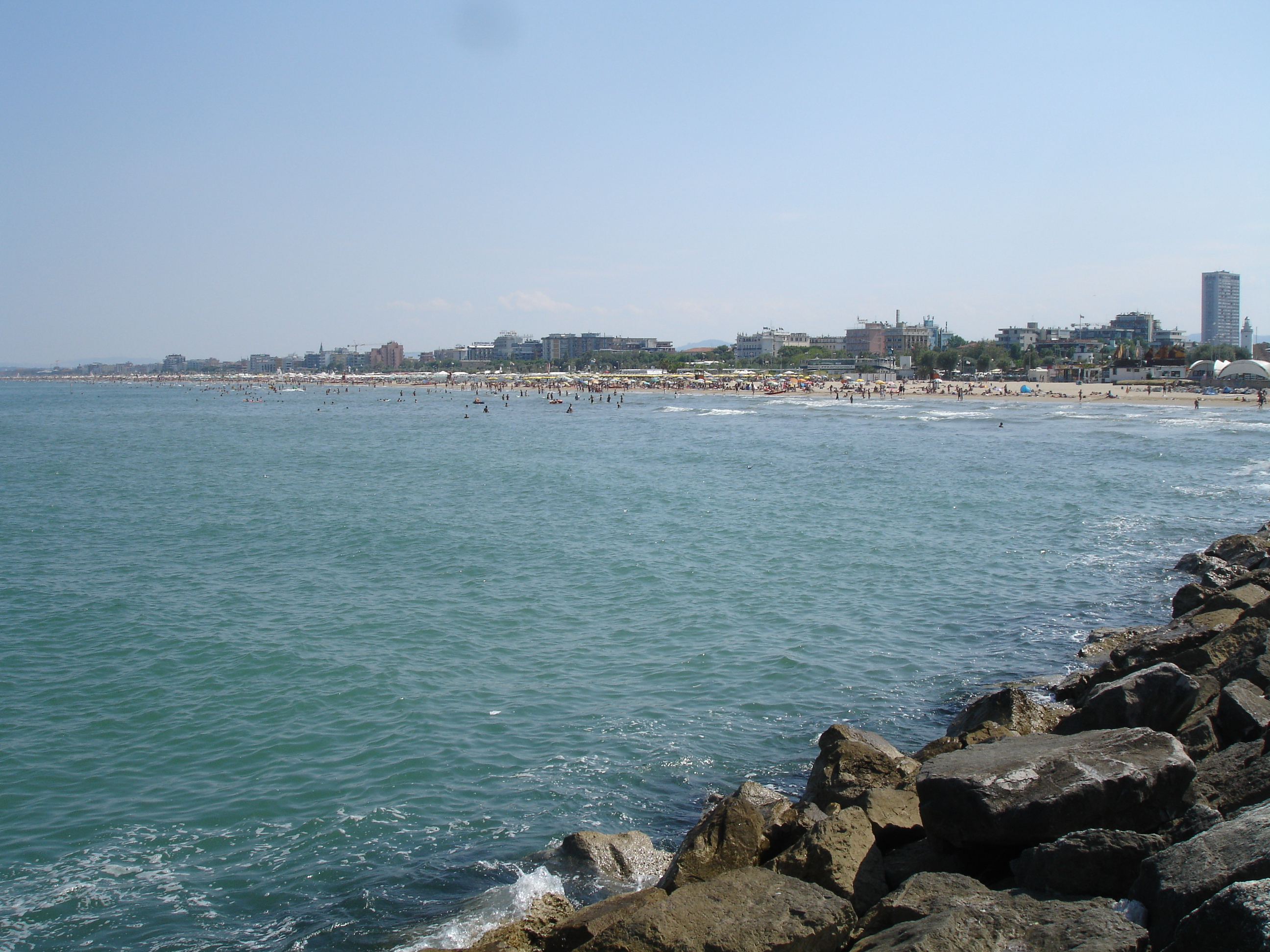 La spiaggia riminese vista dal porto, durante un giorno di agosto.